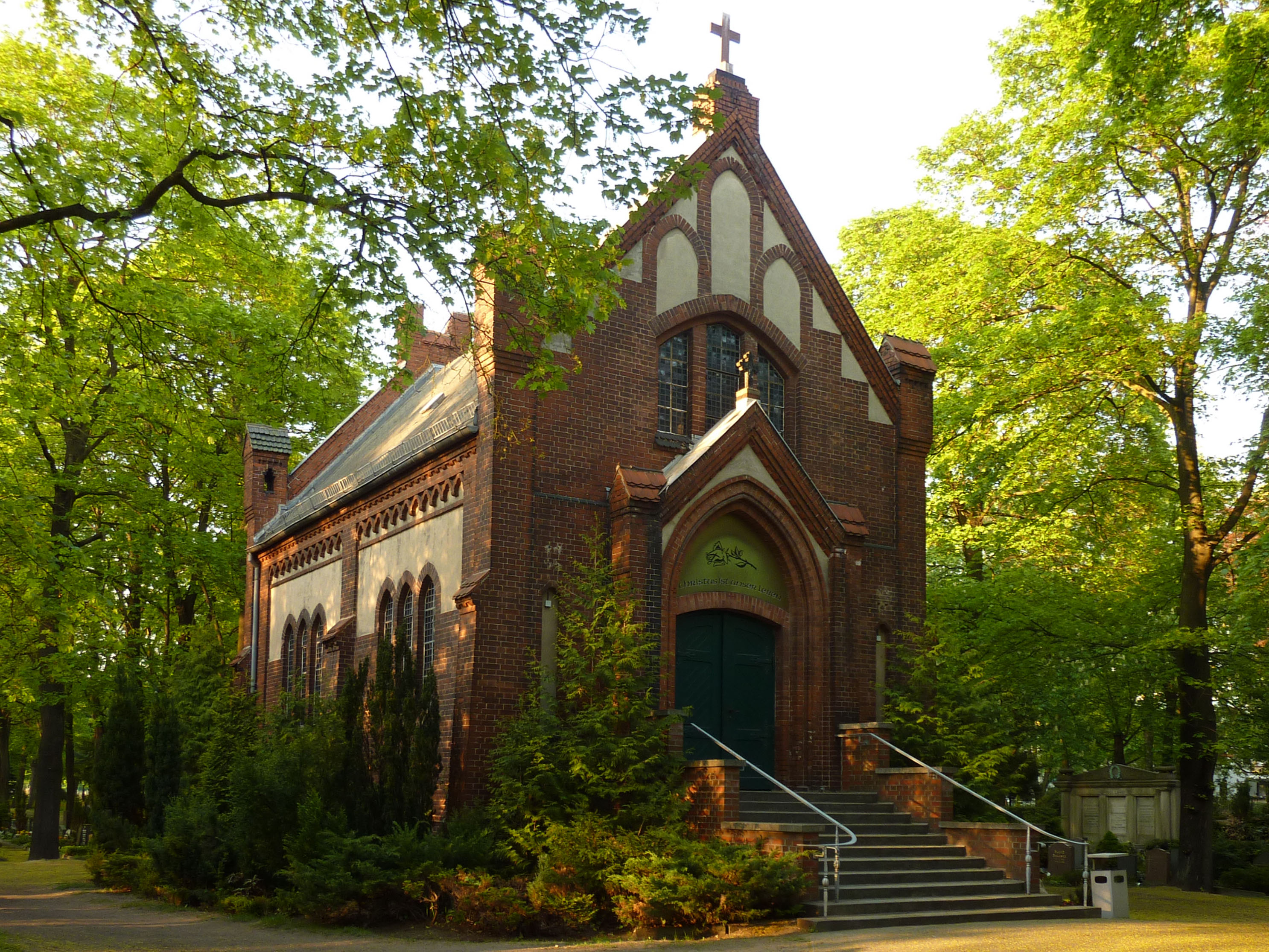 Kapelle auf dem evangelischen Karlshorster und Neuen Friedrichsfelder Friedhof in der Robert-Siewert-Straße in Berlin-Karlshorst.